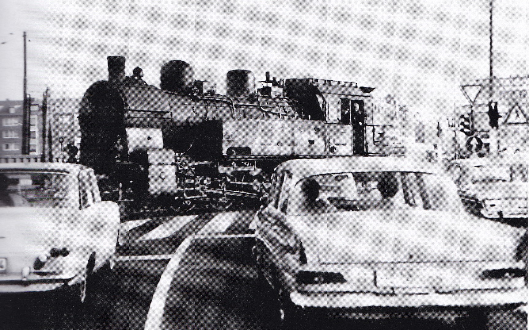 Auf der Rückfahrt von der Rickmerswerft zum Güterbahnhof Geestemünde kreuzt eine BR 94 die neue Hafenrandstraße und die Straßenbahngleise am Elbinger Platz in Bremerhaven.